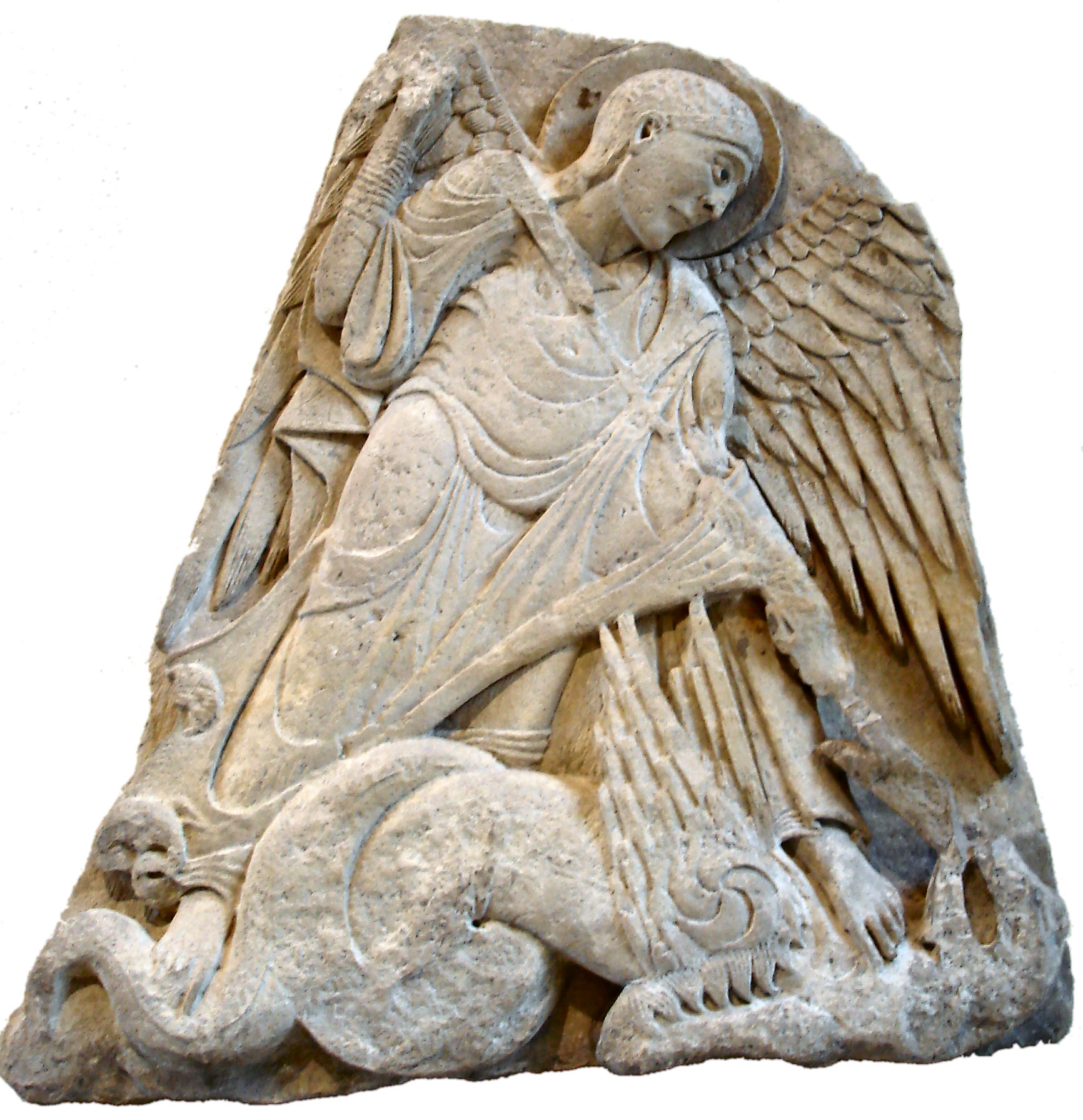 Saint Michel terrassant le dragonPierre, traces de polychromieFigure centrale du tympan de la façade ouest de la chapelle Saint-Michel à l'abbaye bénédictine Notre-Dame de Nevers.Acquis en 1906